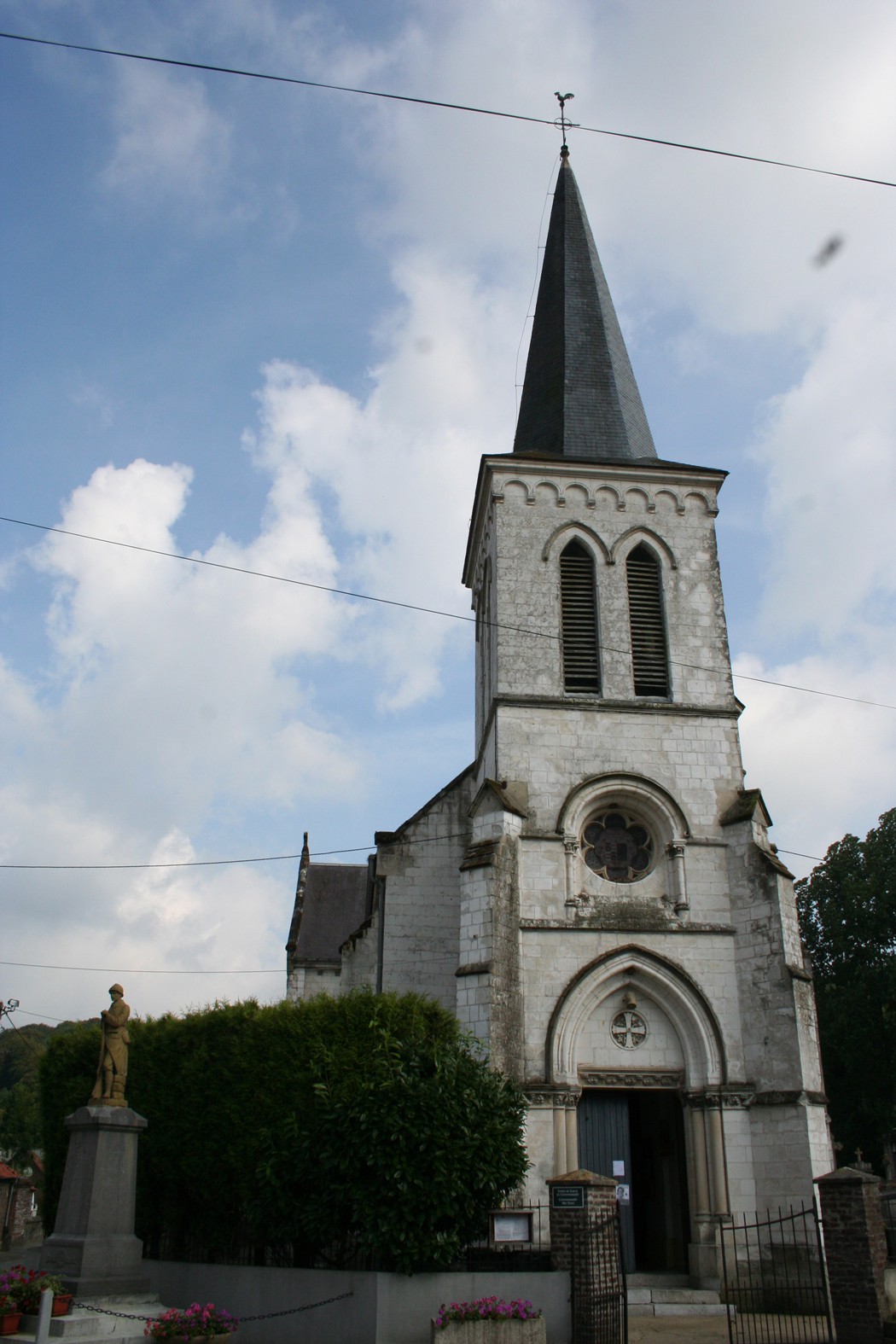 Beussent l'église